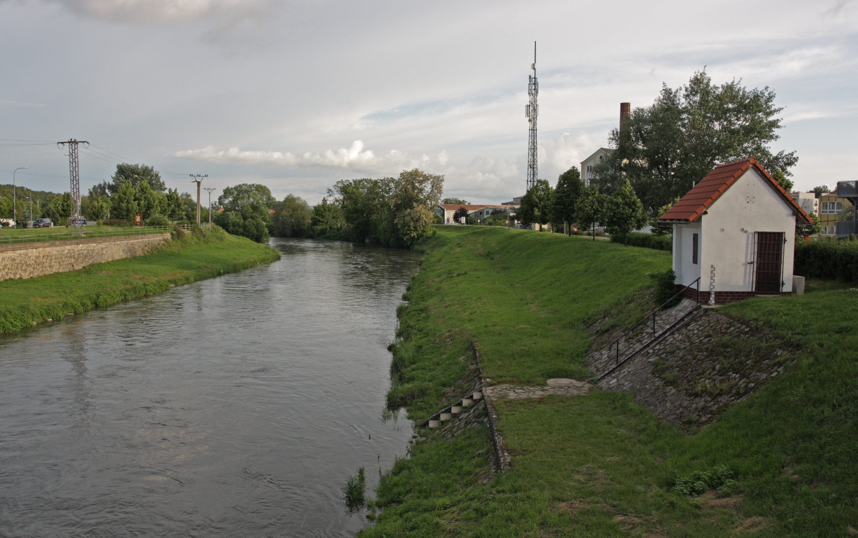 Svratka v Židlochovicích, pohled po proudu.